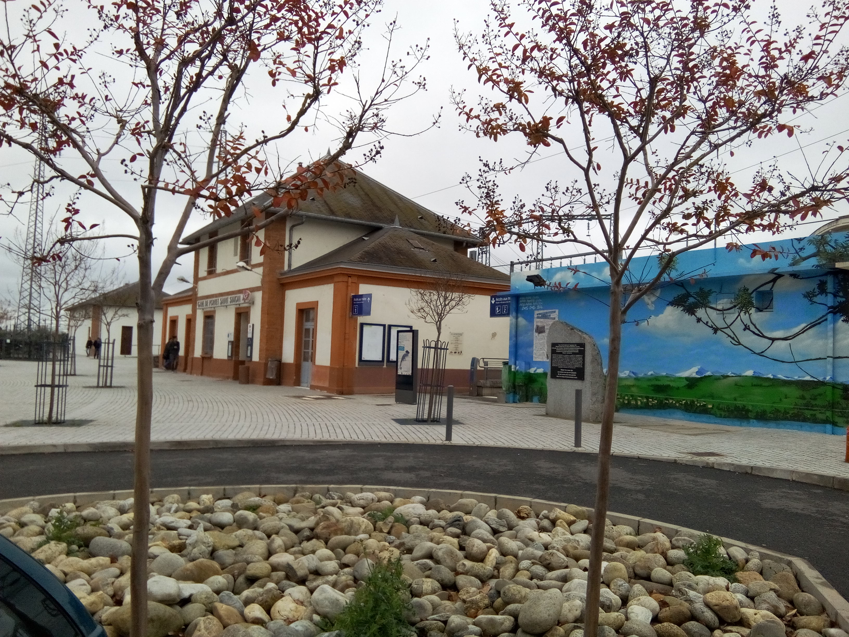 Gare de Portet-Saint-Simon